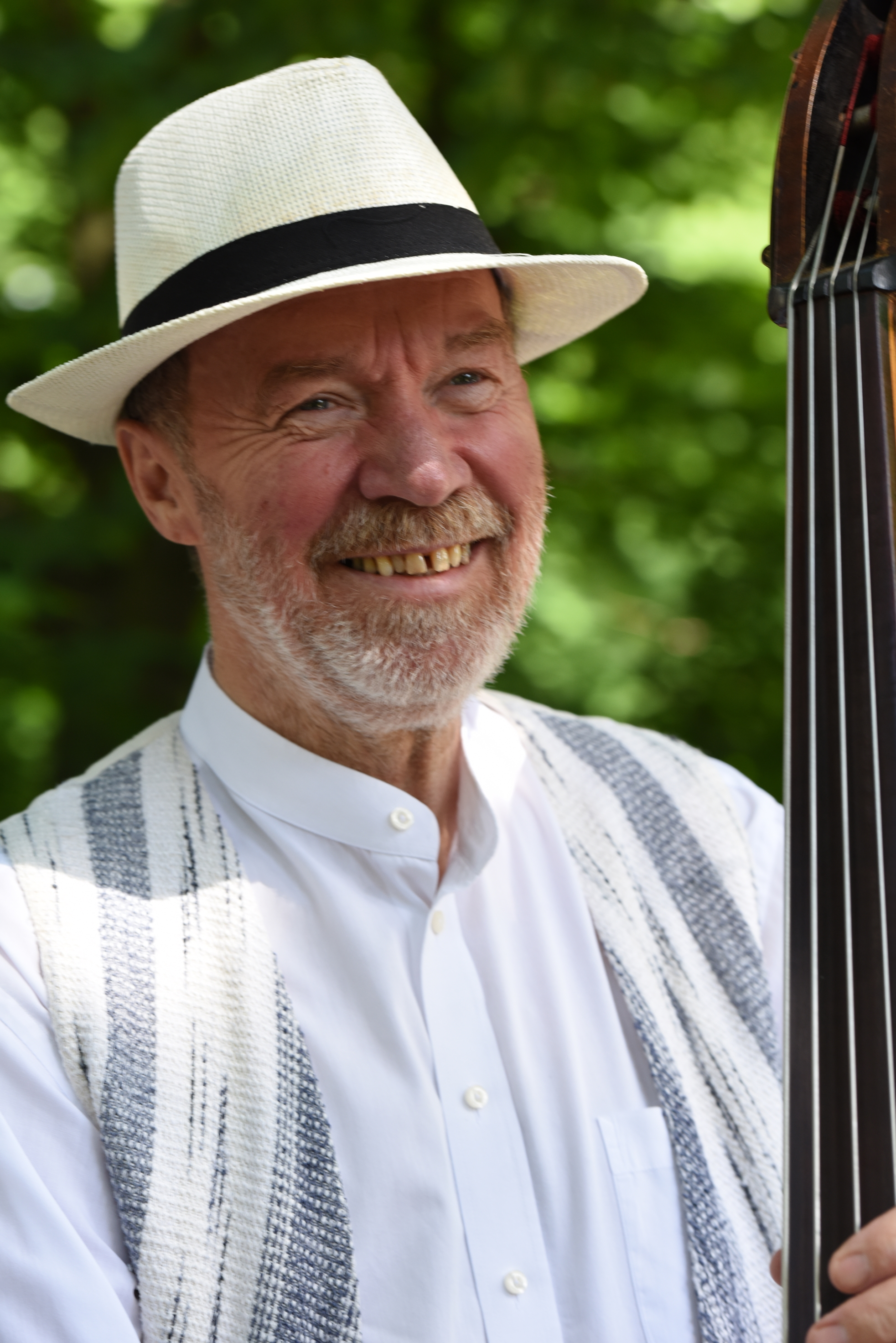 Jerzy Kopiński - członek polskiego zespołu muzycznego Kapela Warszawska.